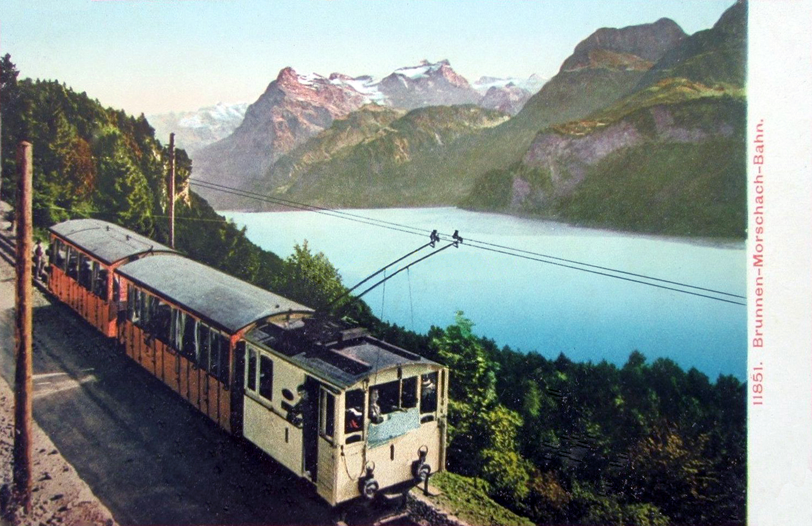 Ansichtskarte der Brunnen-Morschach-Bahn kurz nach der Betriebsaufnahme. Rowanzug mit Lok Nr. 1 und Beiweagen bei Kilometer 1,3. Hersteller der Lok: SLM (mechanischer Teil) und Rieter (elektrischer Teil), Hersteller der Wagen: Waggonbau Bautzen. Im Hintergrund der Vierwaldstättersee.